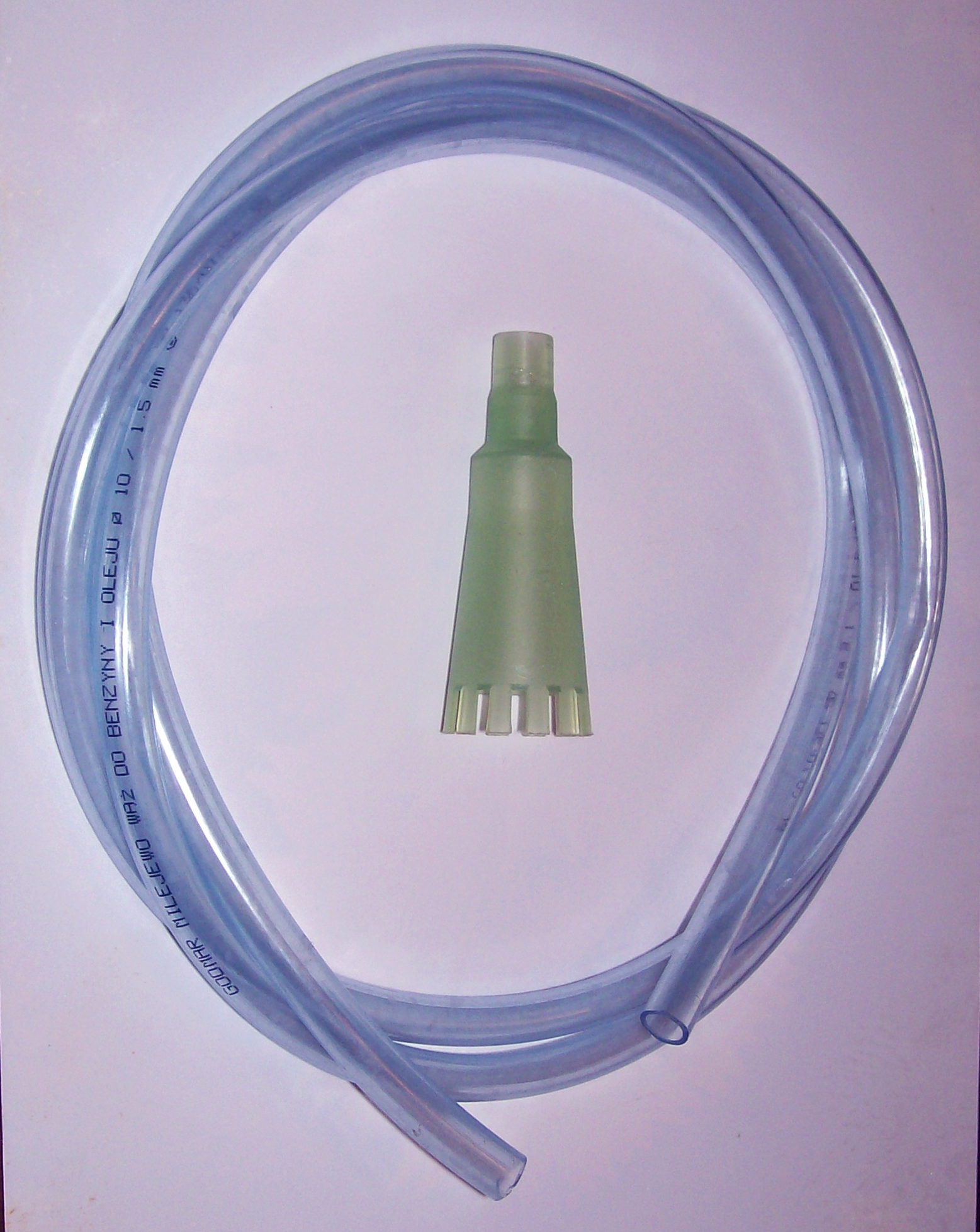 Description:Odmulacz akwarystyczny. Author:Ewkaa